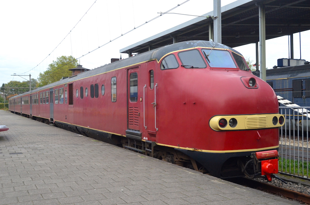 Nederlands Spoorwegmuseum treinstel NS 114. Foto: Erik Swierstra.